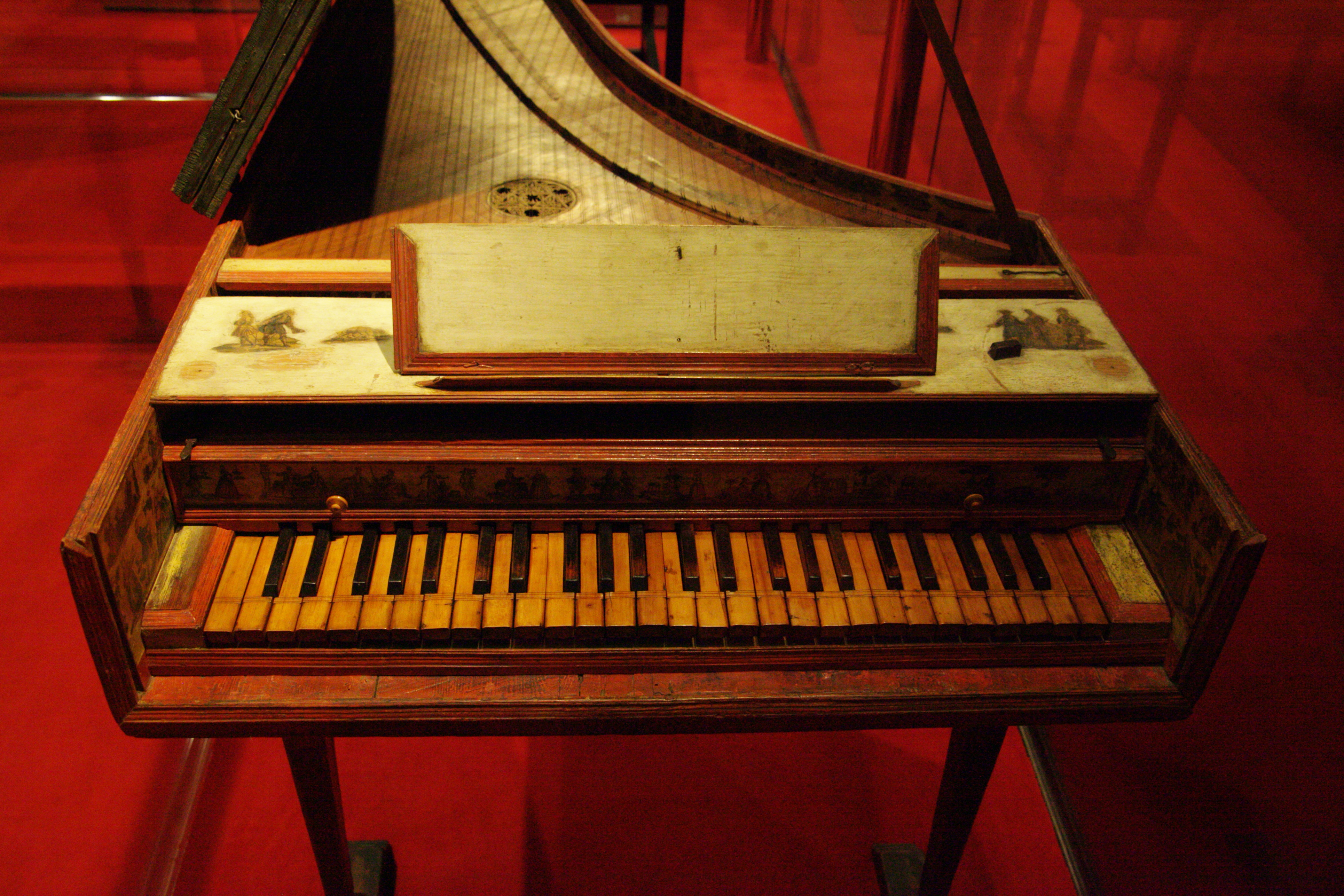 Instruments al Museu de la Música de Barcelona. Fotografies fetes durant el Backstage pass, el 21-11-2013